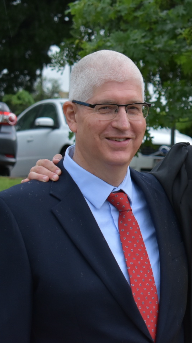 אמיר גניאל, טקסס, 2017